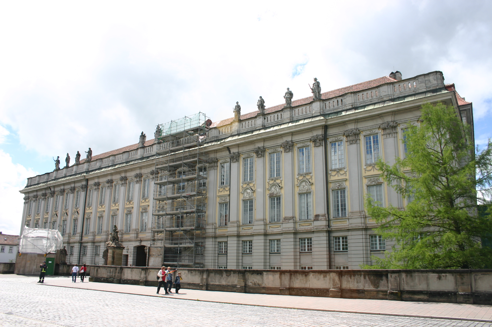 Hauptfassade der Residenz Ansbach. Haupteingang mit den beiden Schilderhäuschen mit Puttengruppen von Domenico Ferretti.